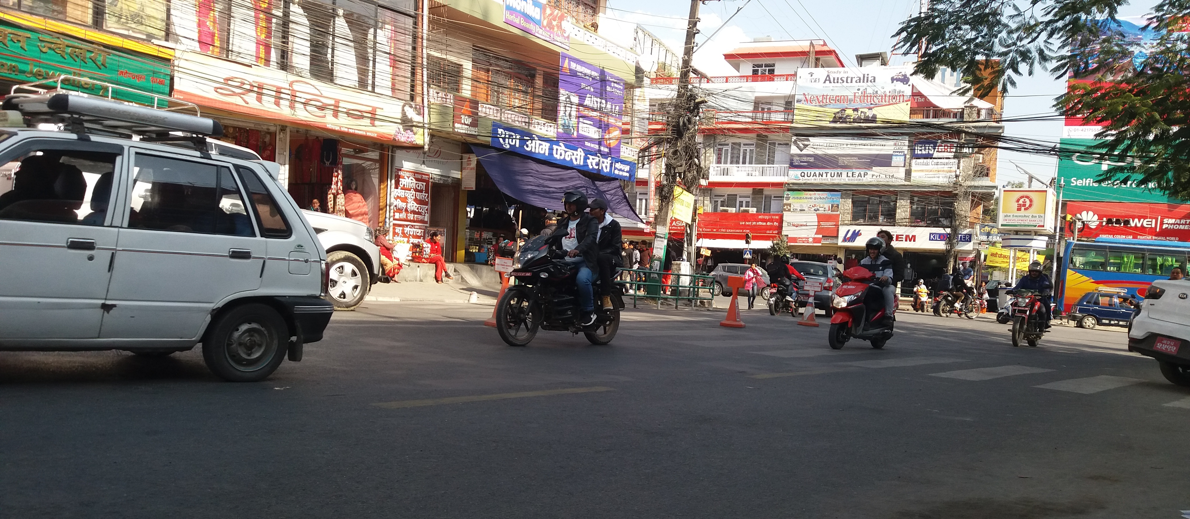 नेपाली: महेन्द्रपुलमा लिइएको एक तस्बिर